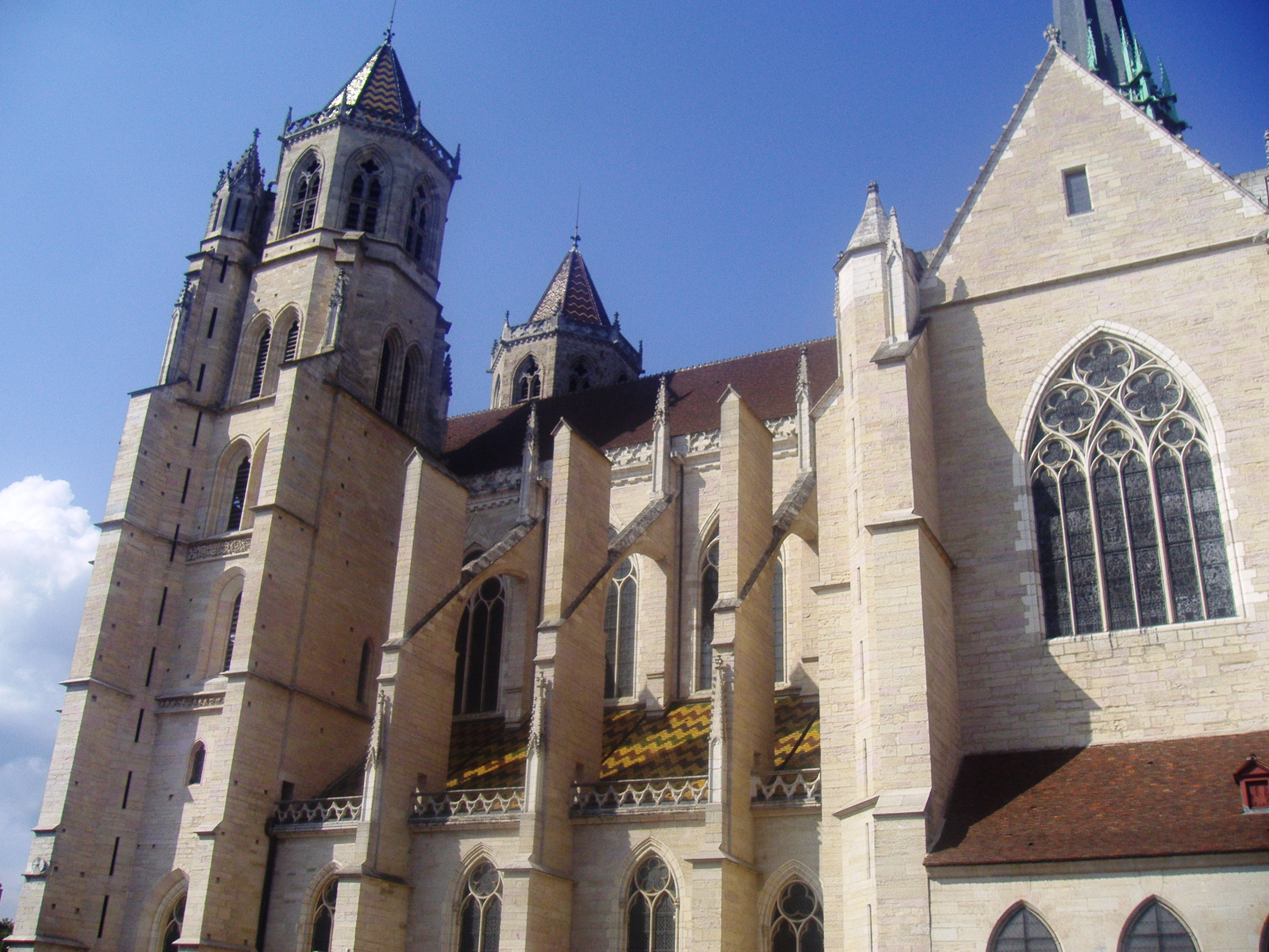 Kathedrale St. Benigne in Dijon , Burgund; Südfassade, Lang- und Querhaus